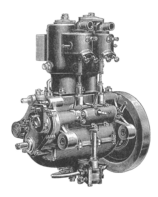 De Dion-Bouton engine (Rankin Kennedy, Modern Engines, Vol III).jpgFig. 84 De Dion-Bouton engine